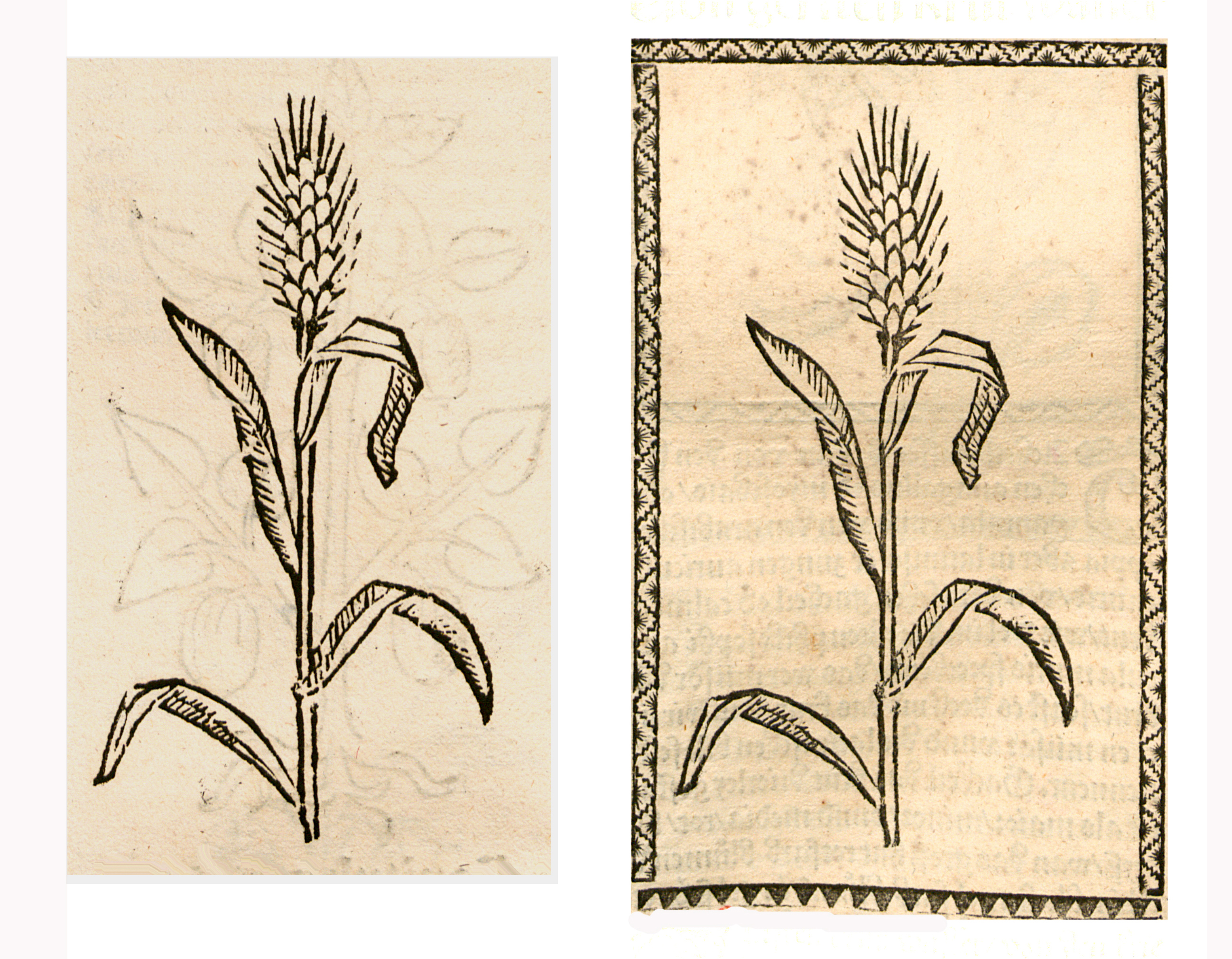 Abbildung von: Gersten Krut (Hordeum vulgare)